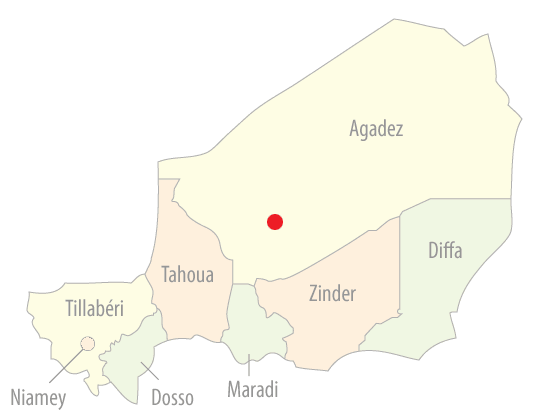 Niger cities location (Agadez)